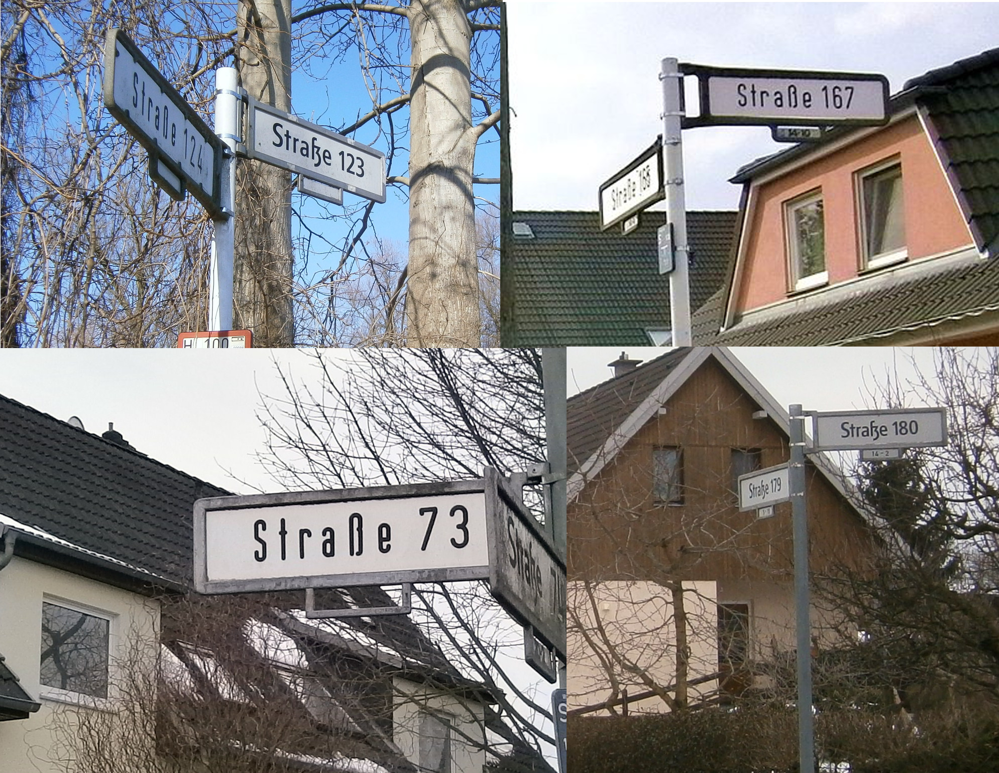 Im Berliner Ortsteil Französisch-Buchholz besteht eine größere Anzahl von Straßennamen, die auf die Nummerierung nach Bebauungsplan zurückgehen. Diese Straßen im Stadtrandgebiet erhielten keine anderen Namen.